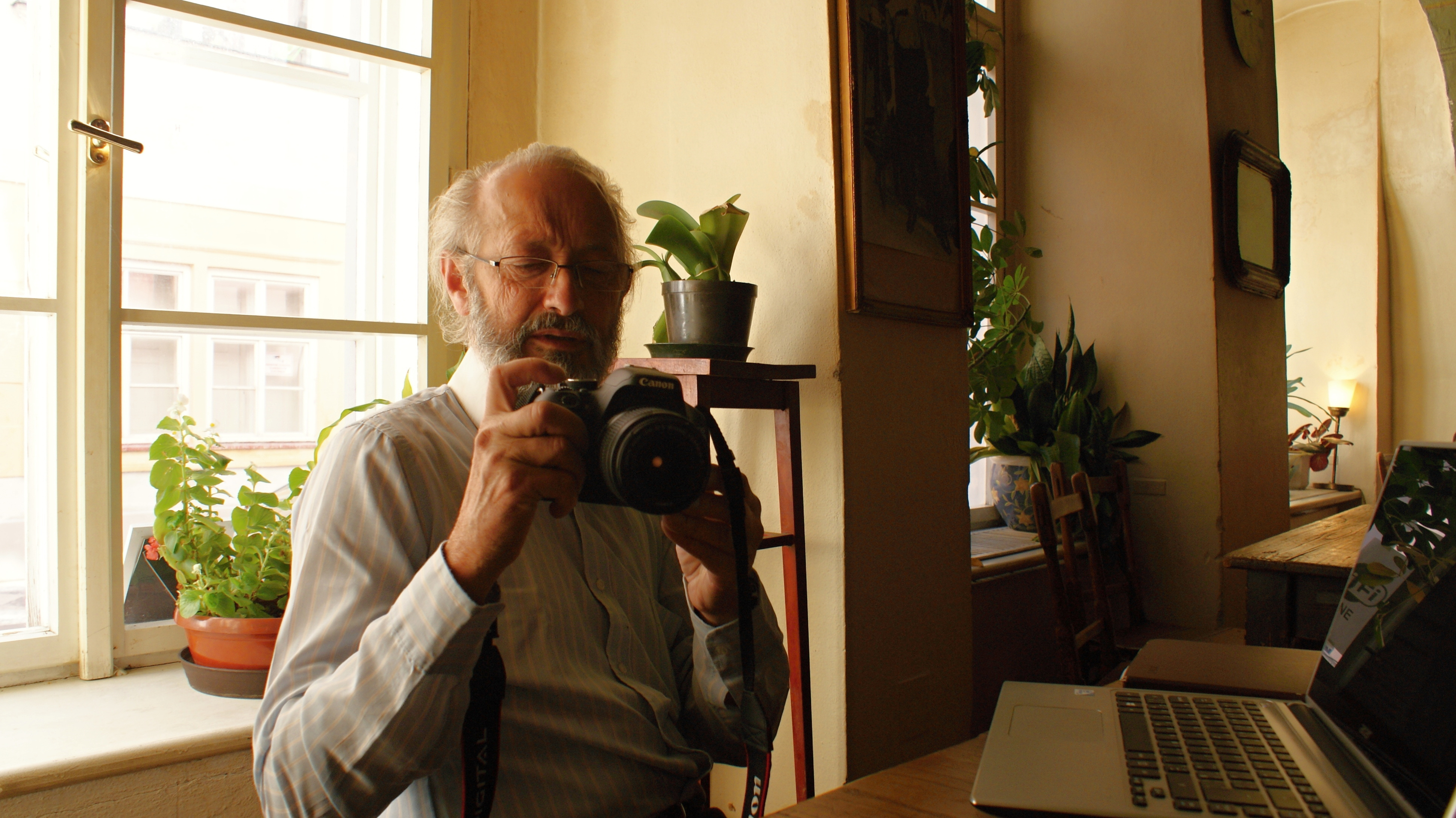 RNDr. Jan Maňák – fotograf na chráněném pracovním místě. Na snímku se seznamuje se služebním fotoaparátem CANNON EOS 600D v kavárně Monmartre v Praze